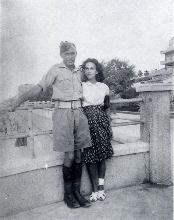 אריה ודבורה ארוך לפני ביתם ברחוב הירקון, תל אביב, 1943.